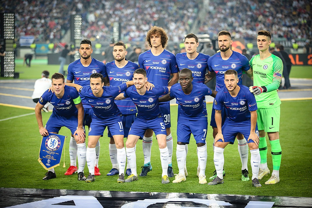 مسابقه چلسی و آرسنال، فینال لیگ اروپا ۲۰۱۹